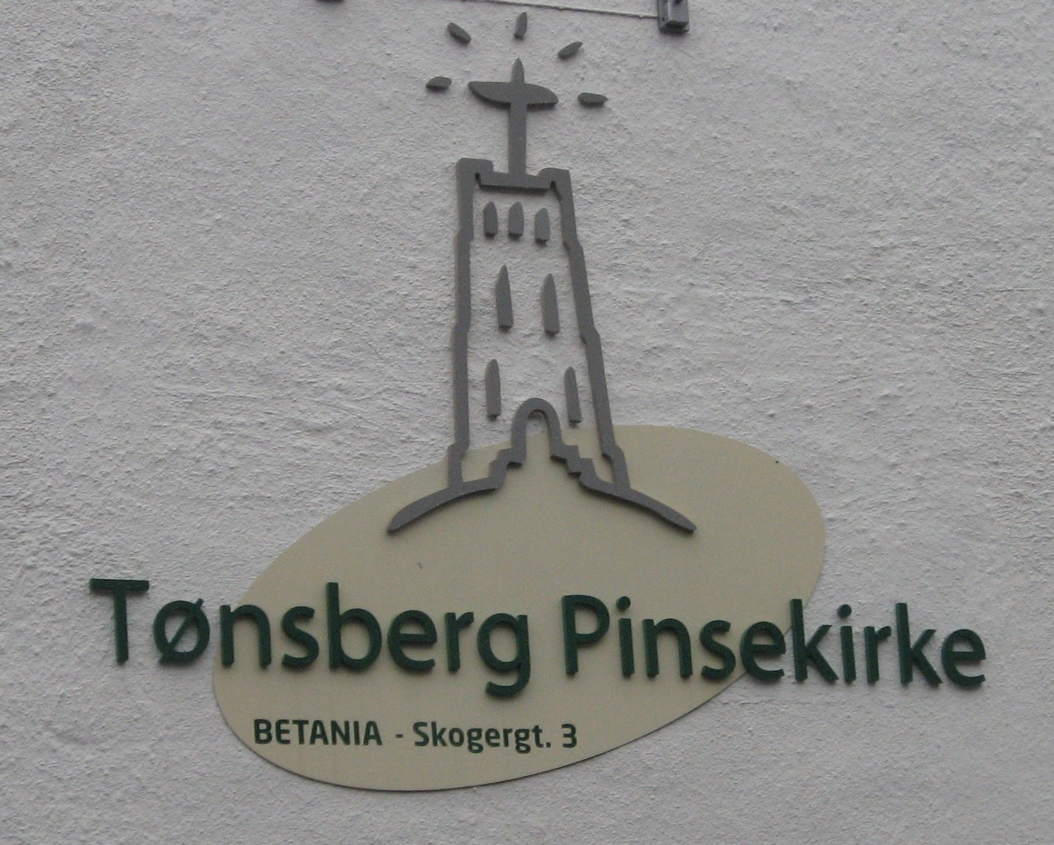 Tønsberg Pinsekirke Betania (a pentecostal church in Tønsberg, Norway).